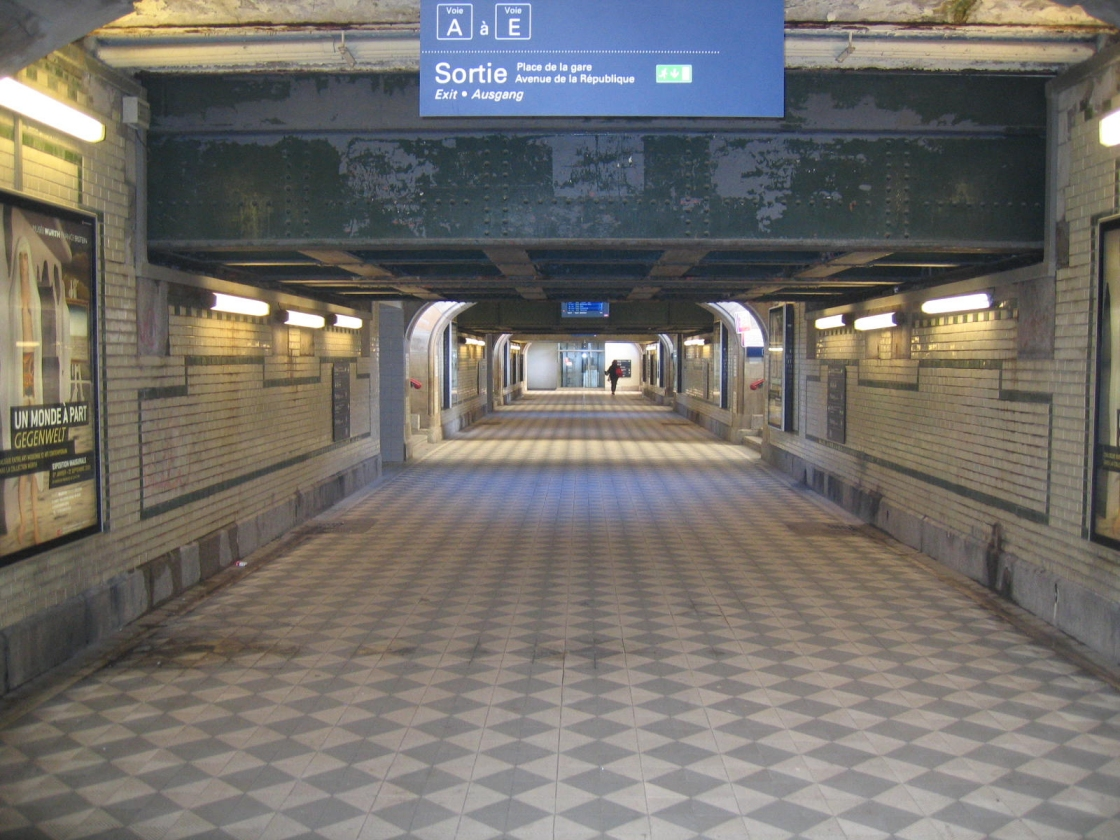 Le passage souterrain de la gare permettant d'accéder à l'ensemble des quais ainsi qu'à l'ouest de la ville